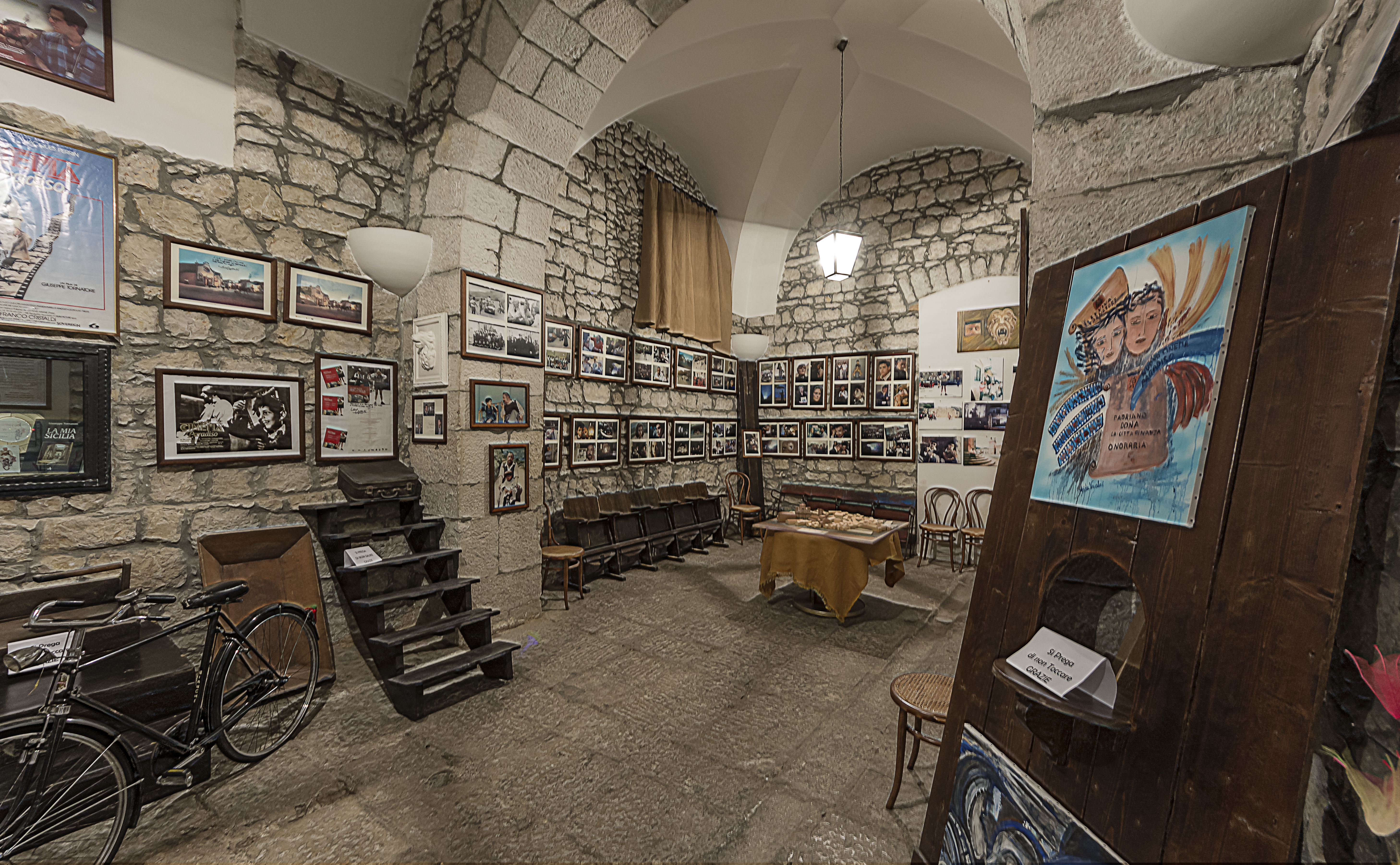 Museo del cinema This is a photo of a monument which is part of cultural heritage of Italy.